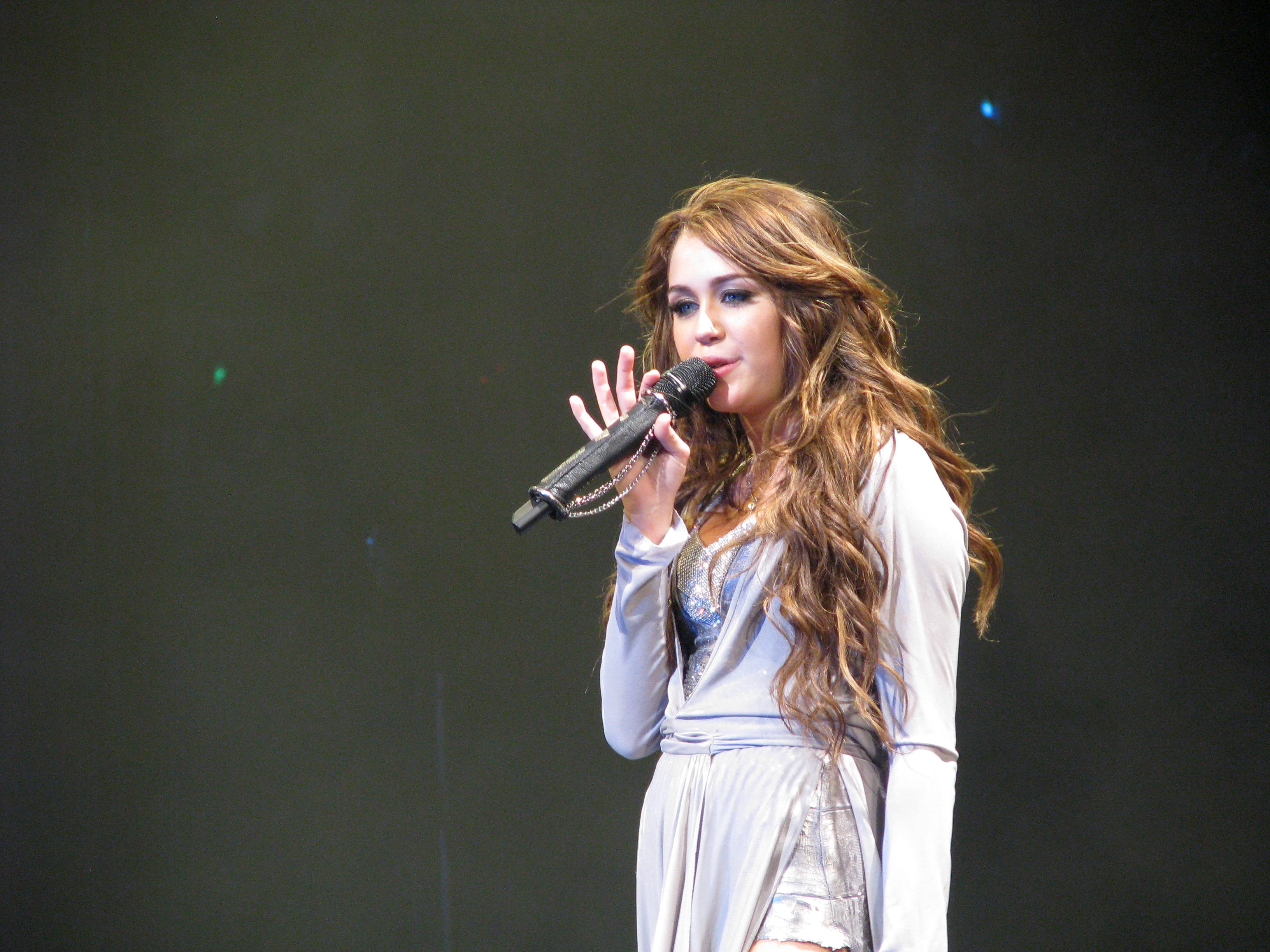 A teen singing.